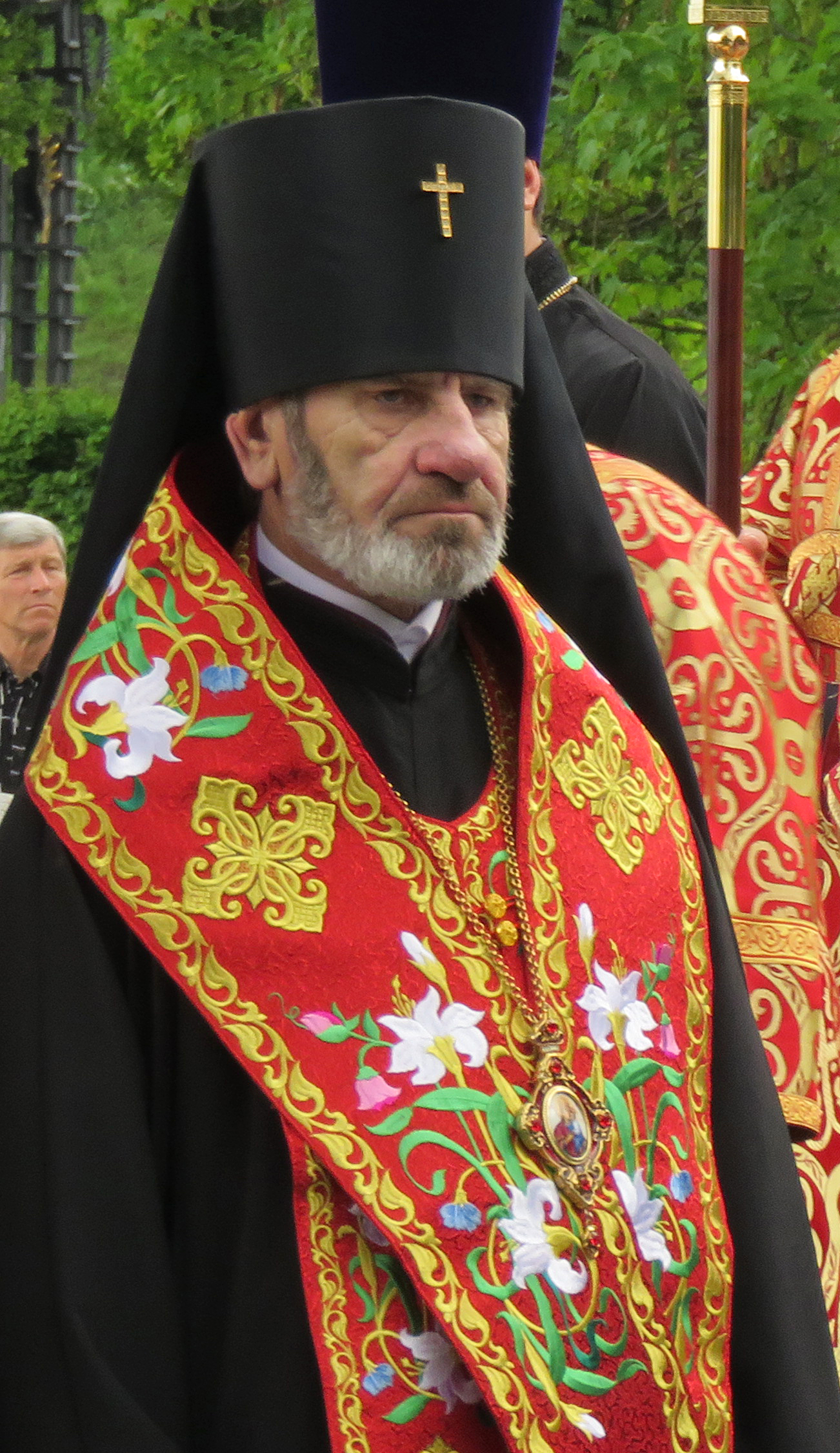 Николай (Грох) в Парке славы